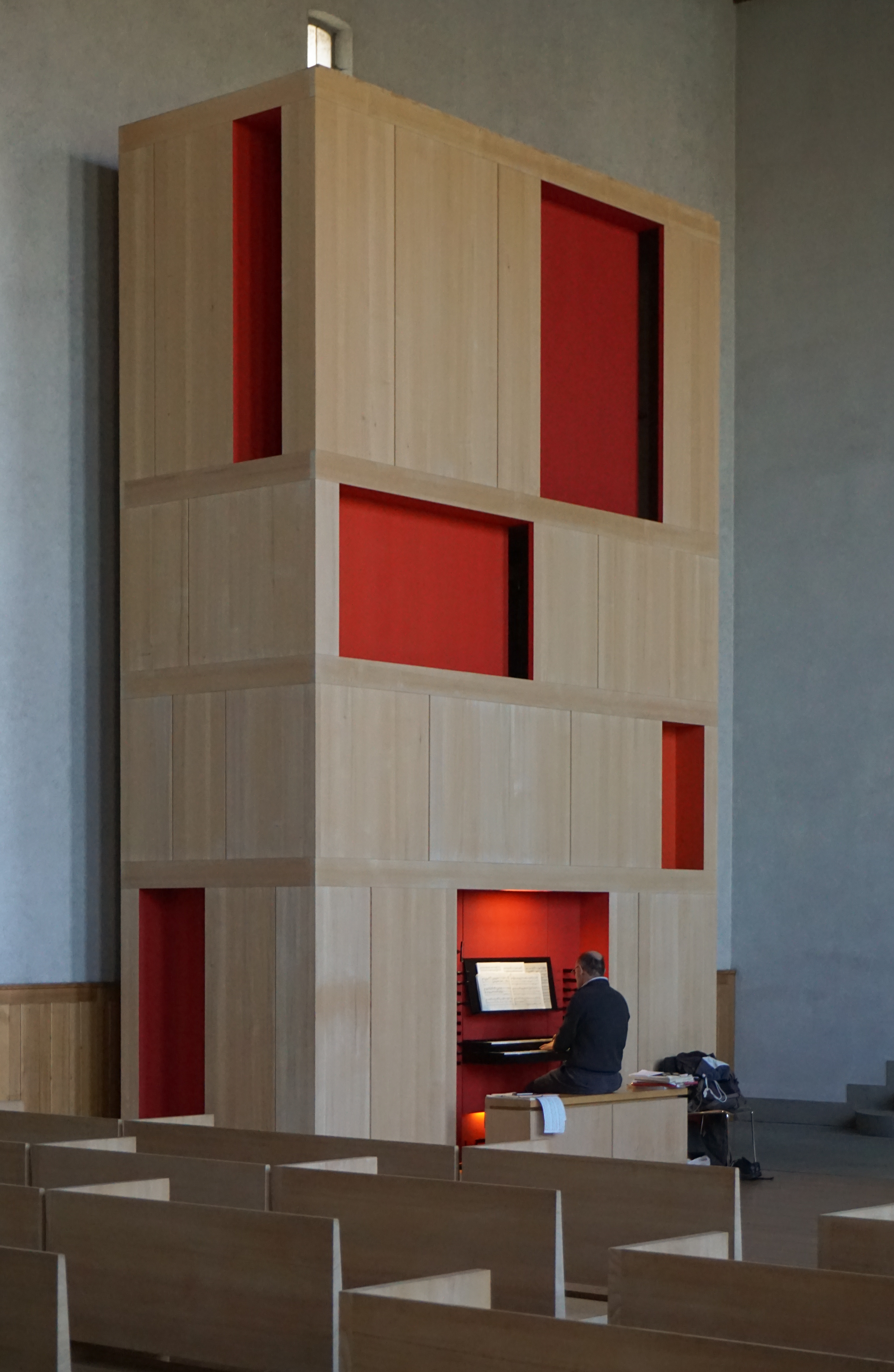 Kirche Wabern, neue Orgel